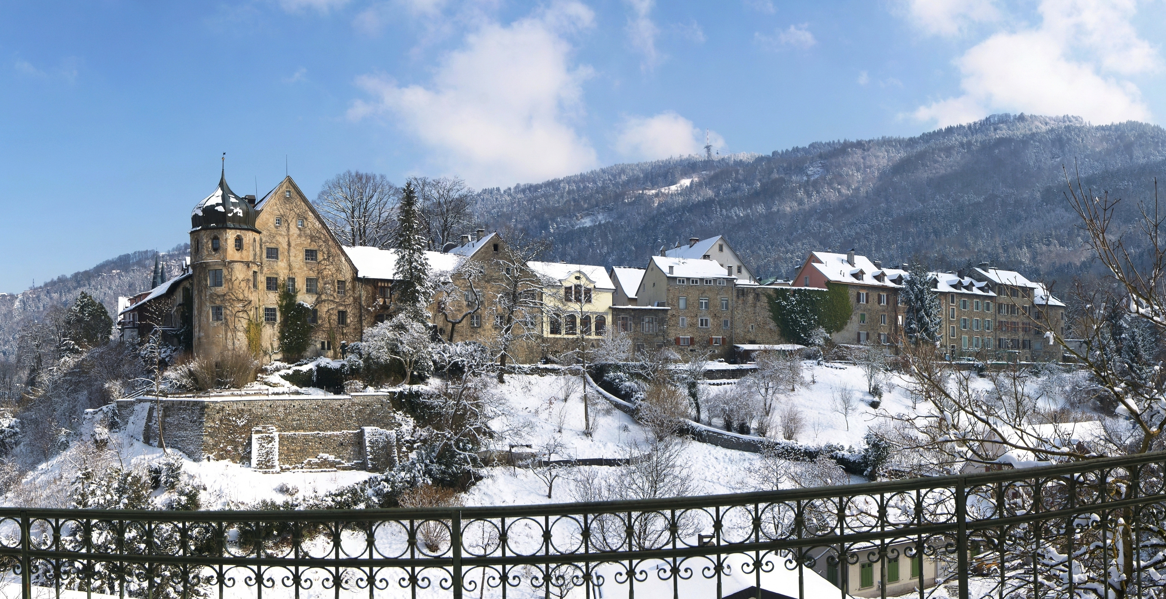 Blick von der Kirchstraße auf die Oberstadt von Bregenz. Hinter dem Eckhaus mit dem Zwiebelturm ( dem Gourmethotel Deuring Schlössle), sieht man die Kirchturmspitzen der Herz-Jesu-Kirche.